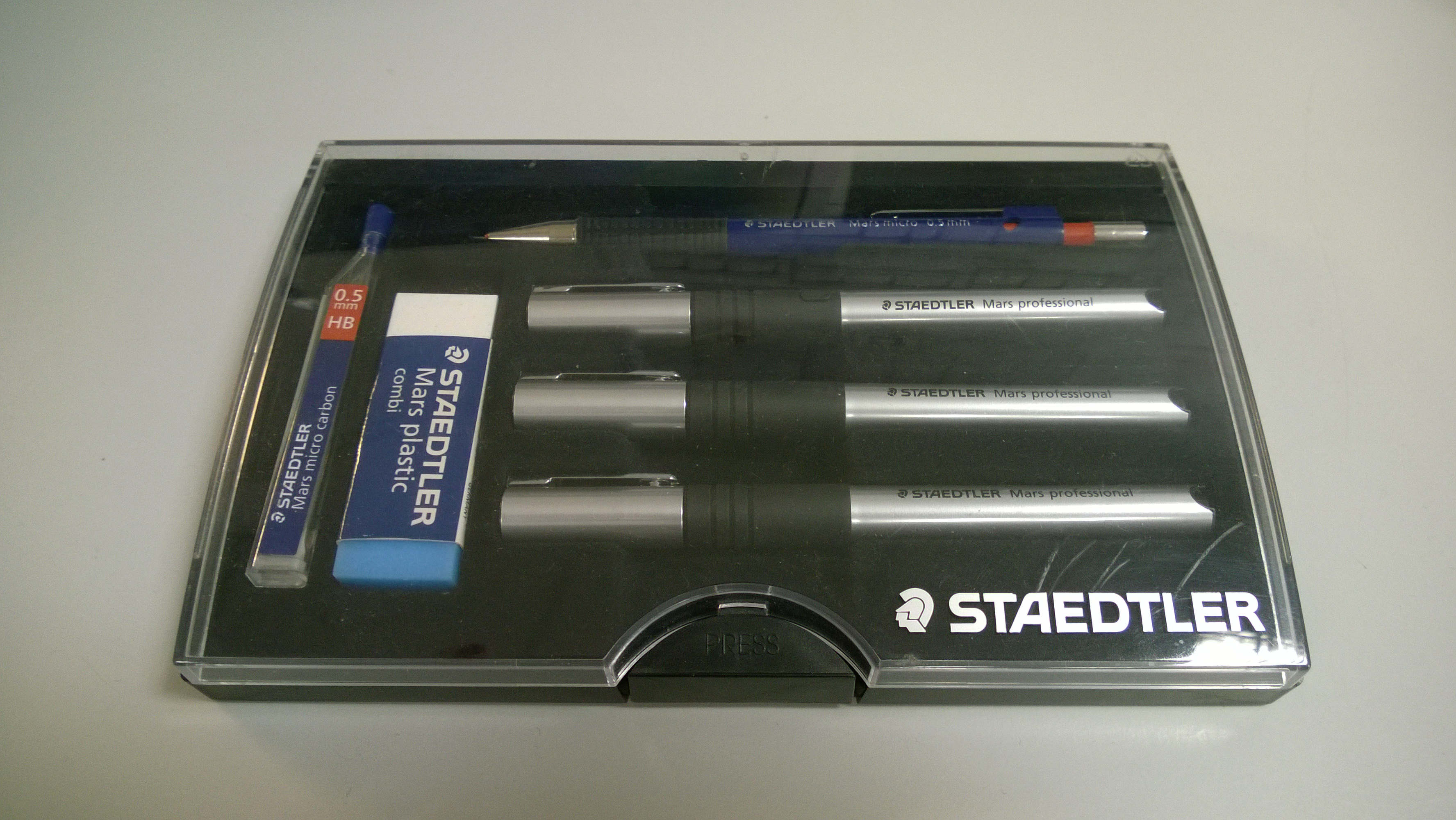 Tuschezeichenset STAEDTLER mars professional mit Tuschezeichner in den Strichstärken 0,70mm, 0,50mm und 0,35mm. sowie einem Druckbleistift STAEDLER mars micro 0,50mm aus dem Jahre 2010.